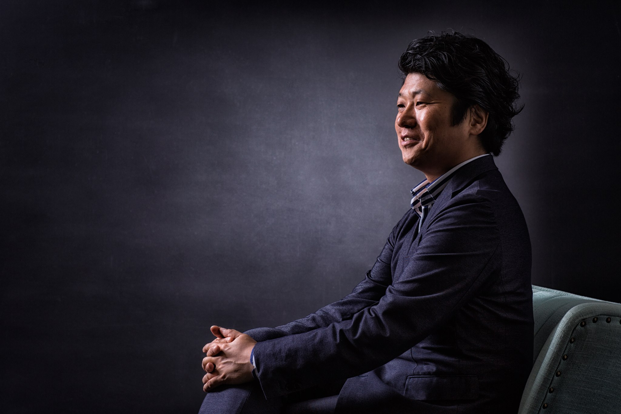 鴨志田由貴のプロフィール画像